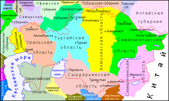 División territorial del Imperio Ruso a lo que hoy es Kazajstán/Казахстан в границах Российской Империи/Kazakhtan's borders in Russian Imperia